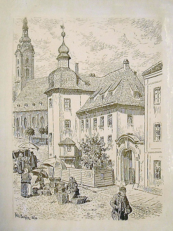 Das Alte Johannishospital in Leipzig mit der Johanniskirche um 1880, Federzeichnung von Fritz Bergen